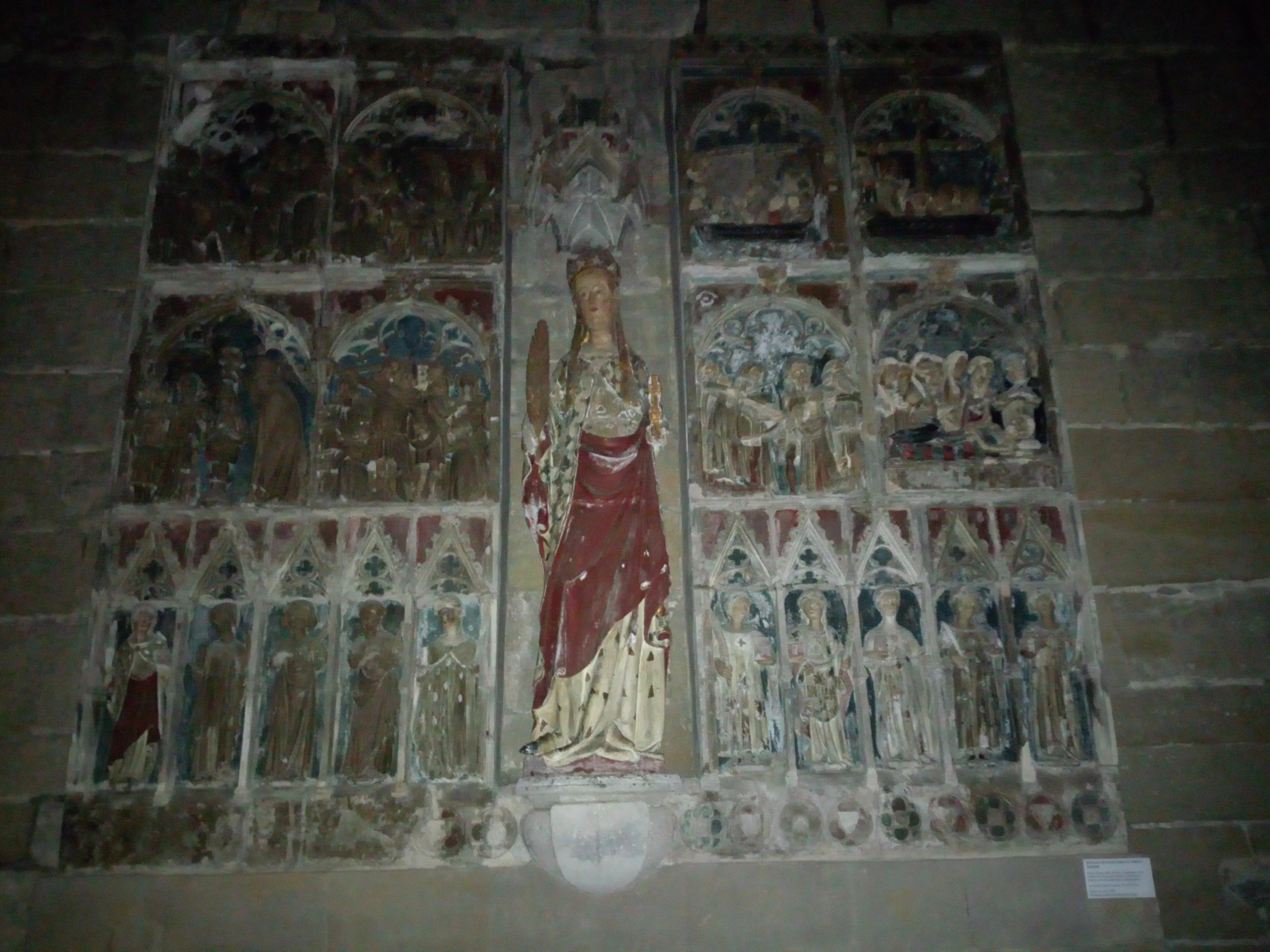 Reubicat a la nau de Santa Bàrbara Autor: Jaume Cascalls, segle XIV